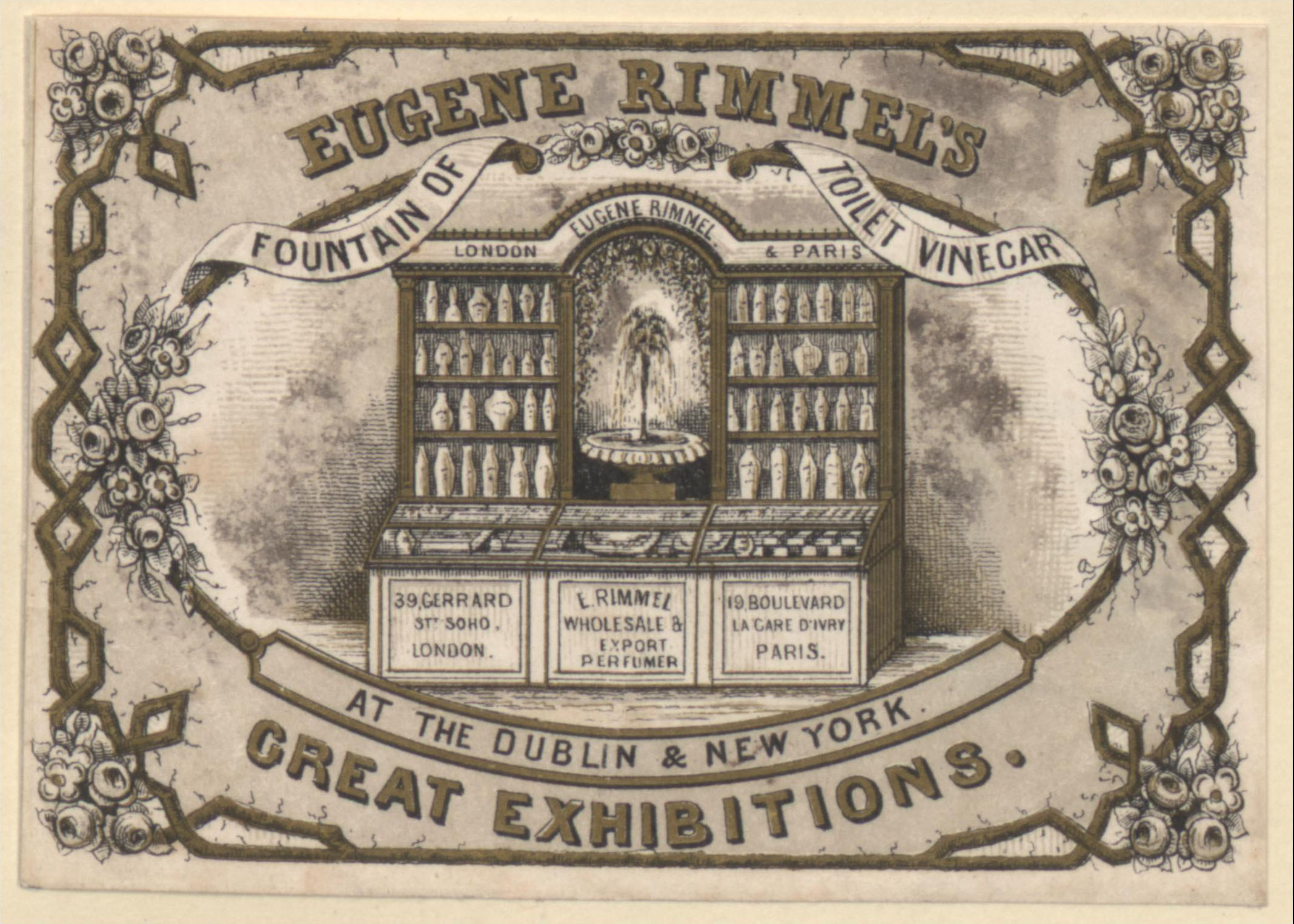 Advertising for Eugene Rimmel's toilet vinegat